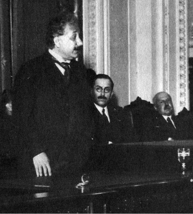 Albert Einstein junto a los científicos argentinos José Arce y Ángel Gallardo, en el Colegio Nacional de Buenos Aires.